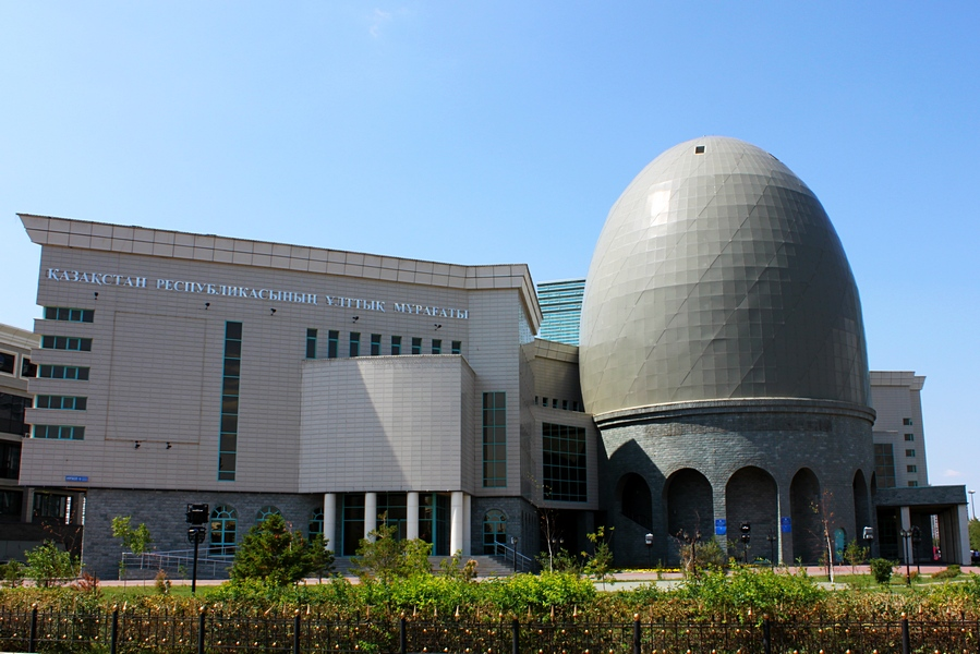 Архив